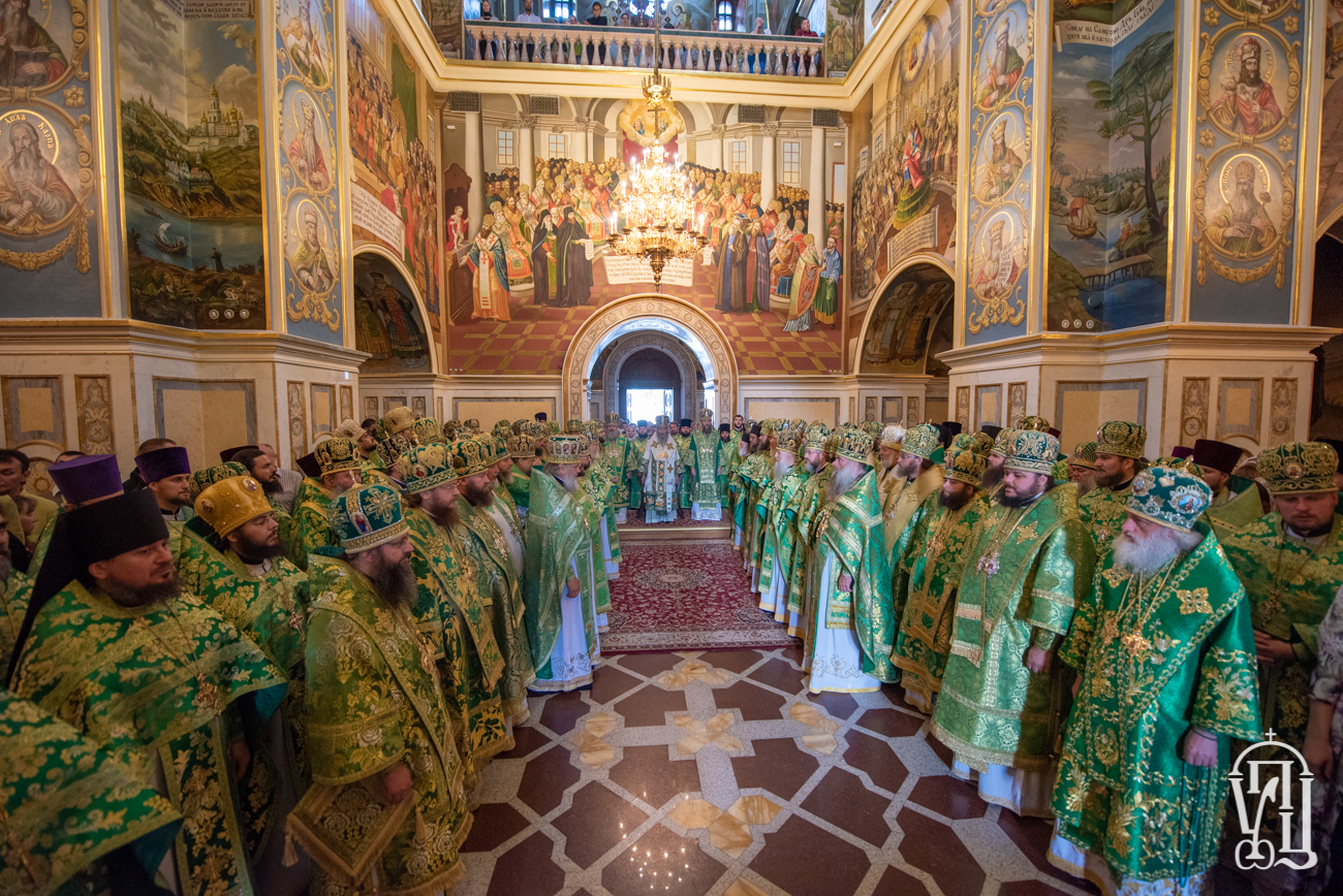 23 июля 2019 года, в день памяти преподобного Антония Печерского, начальника всех русских монахов, Блаженнейший Митрополит Киевский и всея Украины Онуфрий совершил Божественную литургию в Успенском соборе Свято-Успенской Киево-Печерской Лавры.